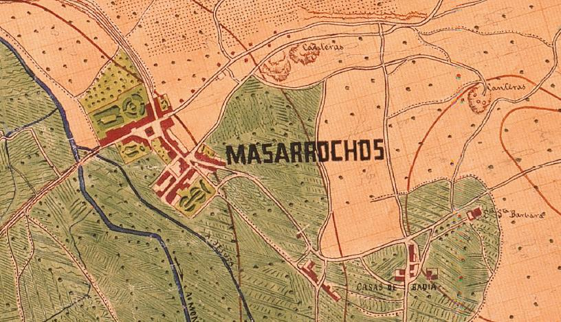 Massarrojos el 1883 (el nord està a la dreta).